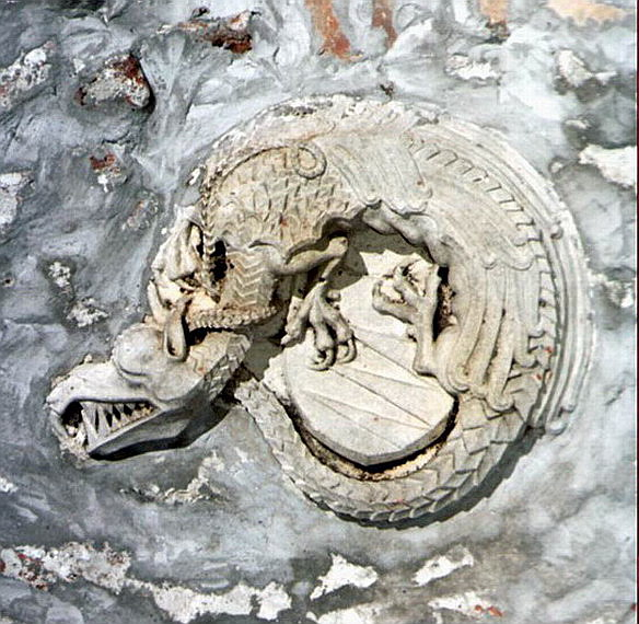 Kameni zmaj oko grba velikaÅ¡a MoroviÄ‡a u svodu prvoga kata srednjovjekovne kule dvorca u Valpovu